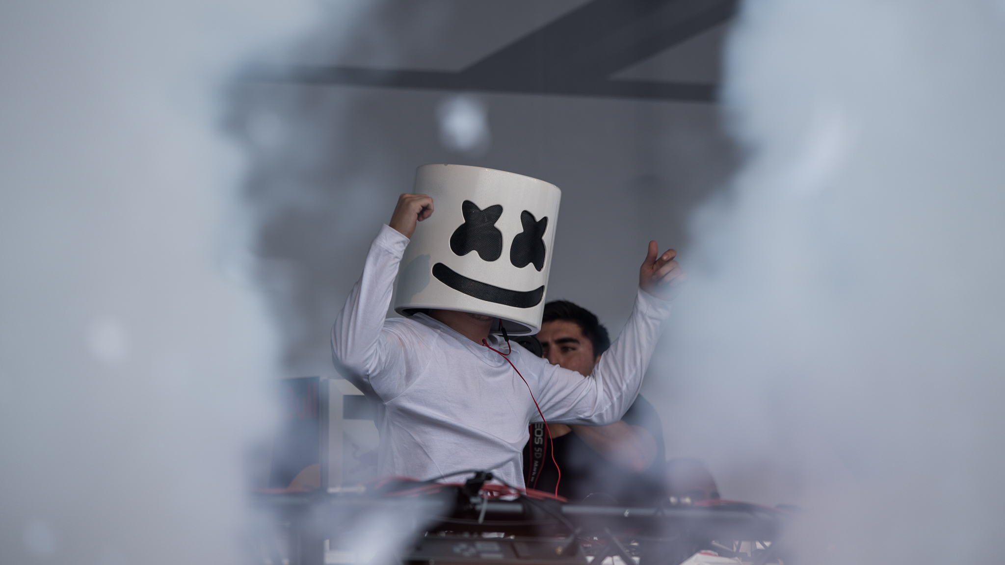 Festival,Konzert,Livekonzert,Livemusik,Mainstage,Marshmello,Musik,Open Beatz 2016